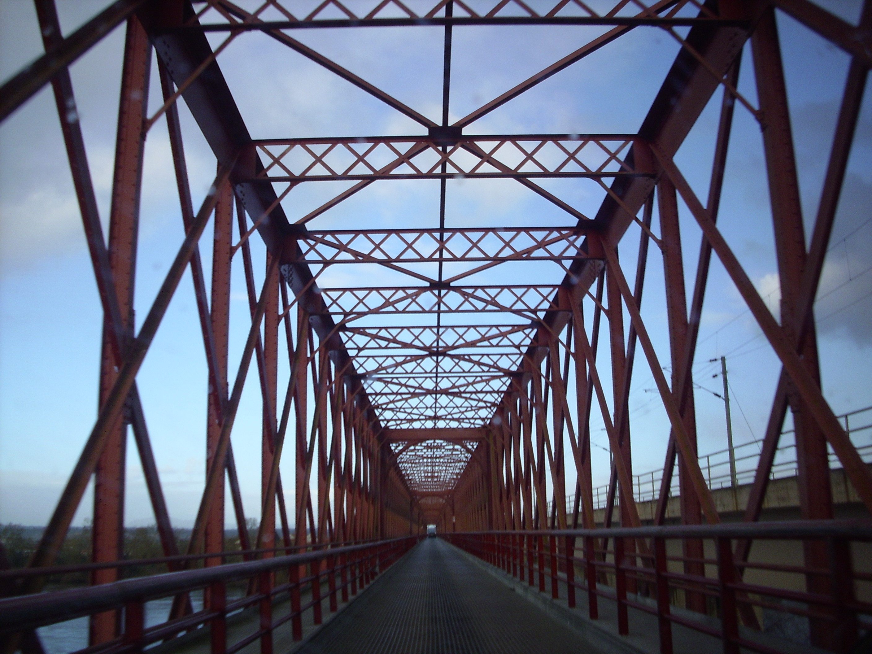 Salvaterra de Magos - Muge